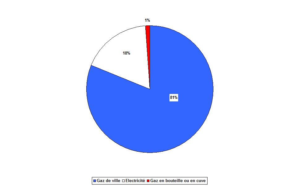 Energies domestiques utilisées par les habitants de Delphos (Ohio - Etats-Unis) en 2009